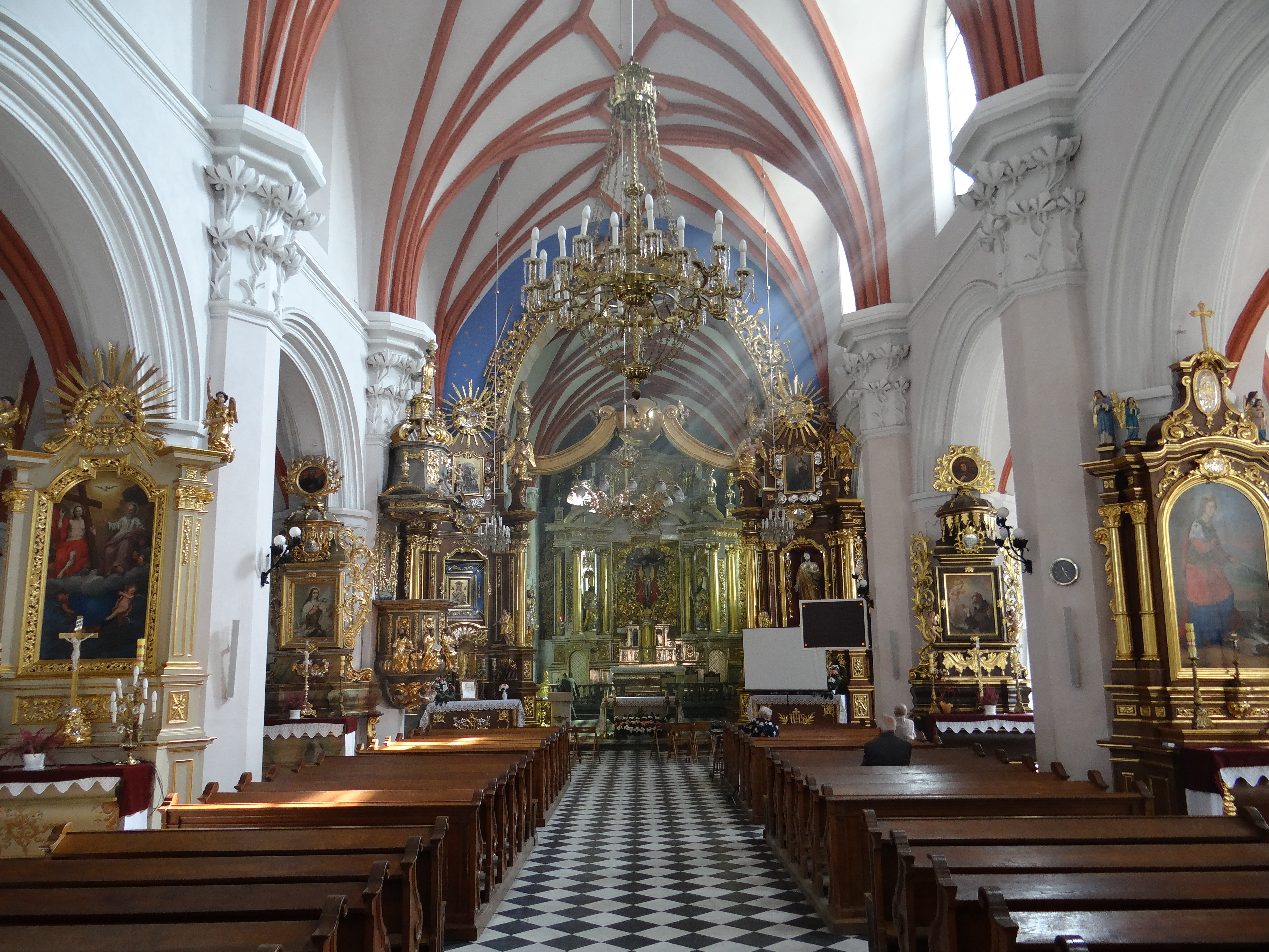 Przeworsk, kościół, ob. par. p.w. Św. Ducha (z kaplicą Grobu Chrystusa), 1430-1473, 1718, 1908